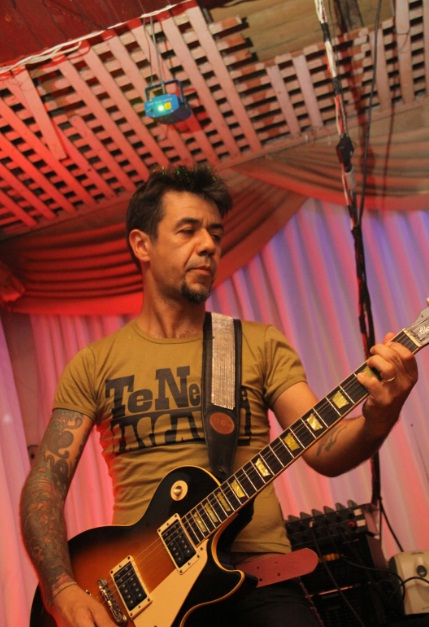 Tchê Gomes, Luiz Henrique Gomes, TNT